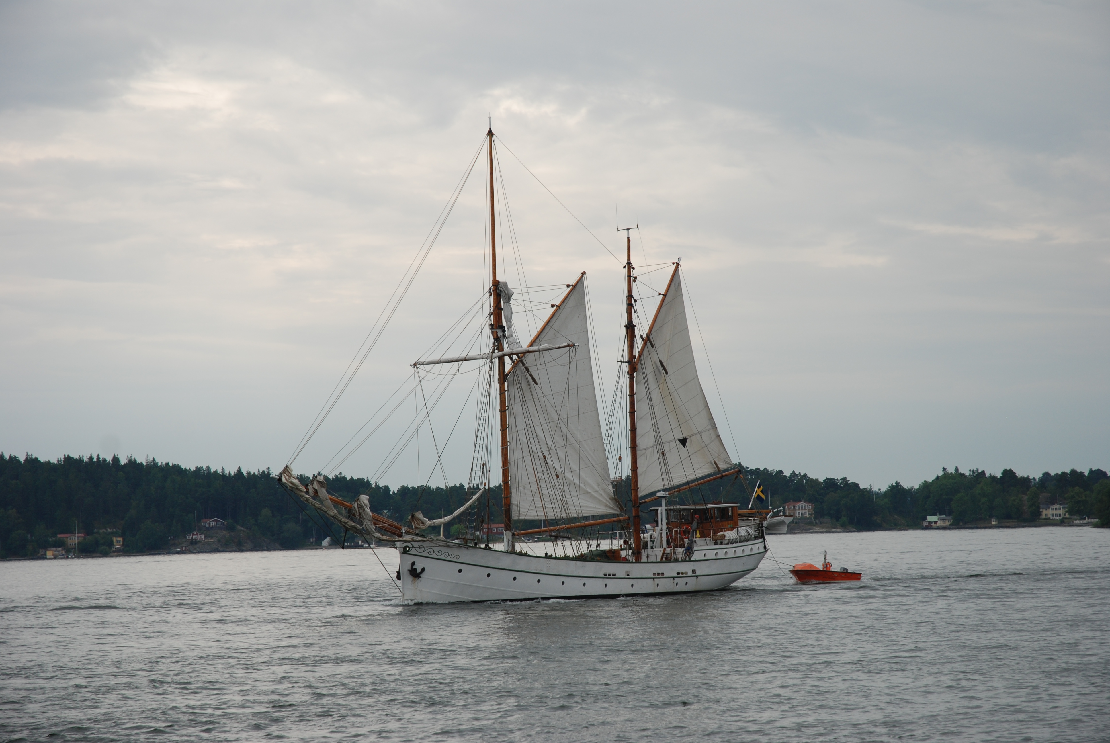 Galeasen Shamrock, Stockholm